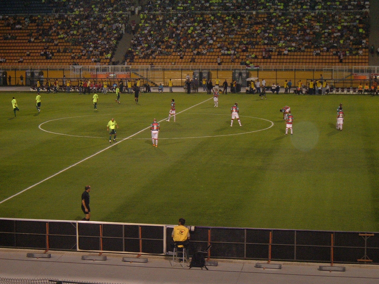 Equipes da Portuguesa e do Palmeiras em partida disputada no Estádio do Pacaembu